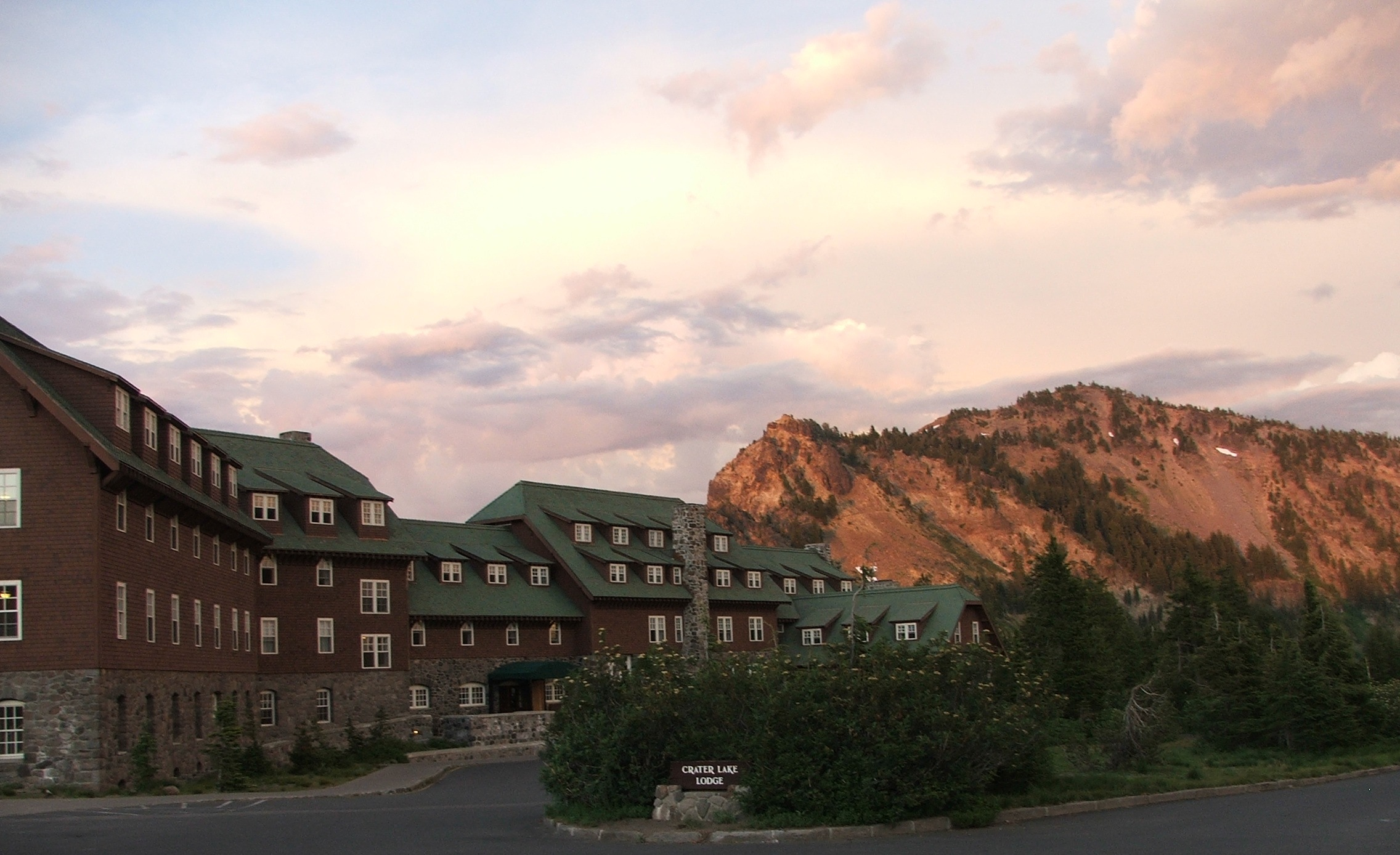 Crater Lake Lodge